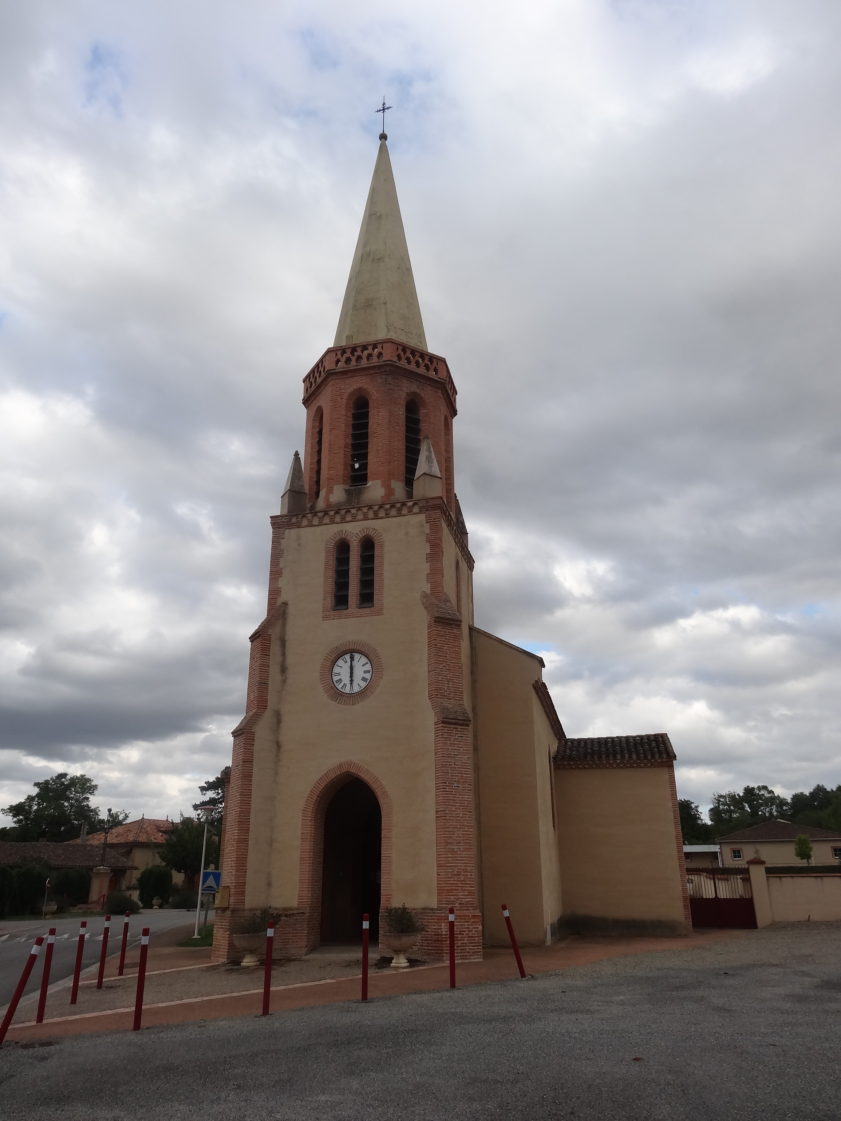 Clocher de l'église d'Aurimont.